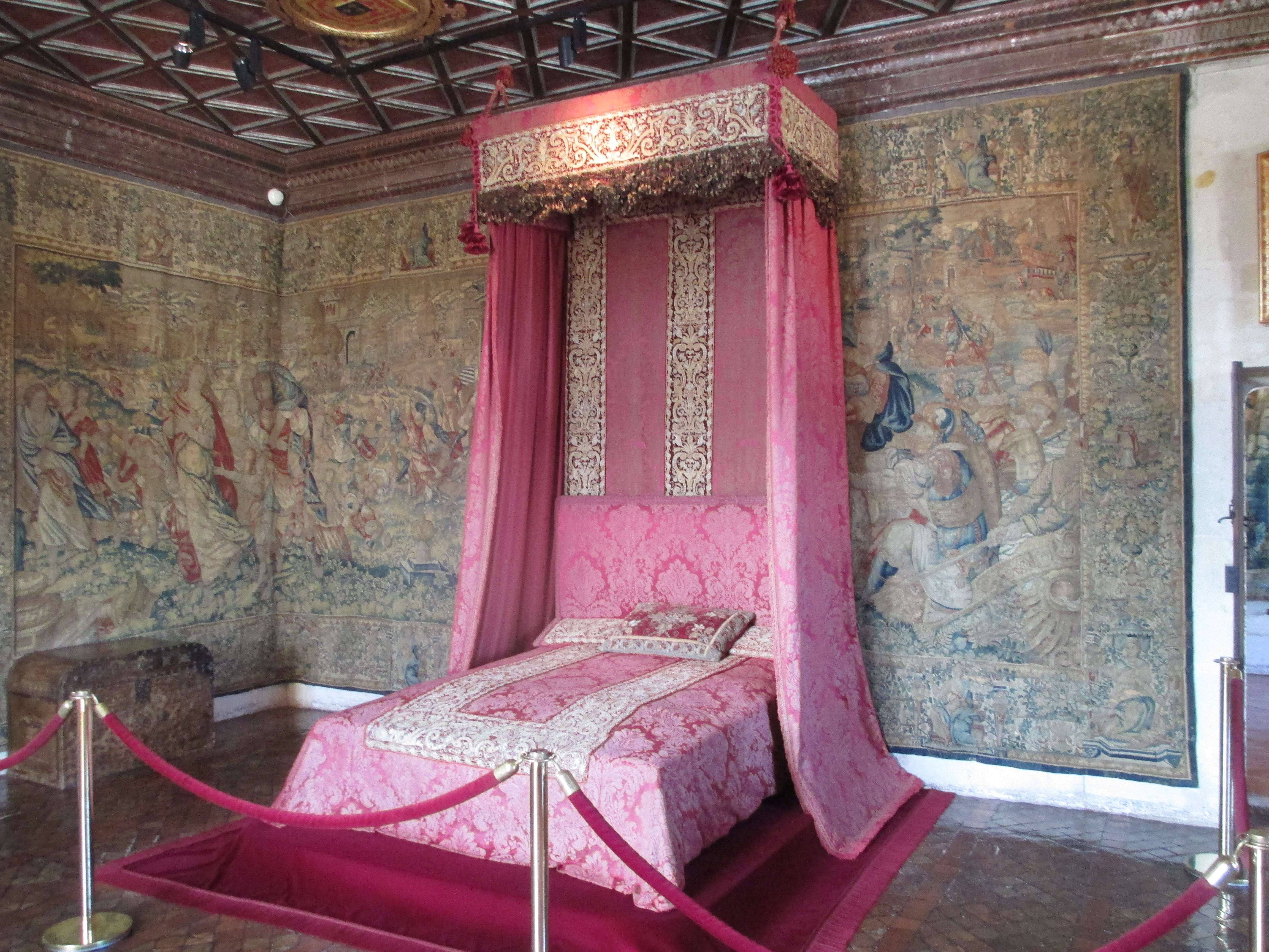 חדר חמש המלכות בטירת שנונסו